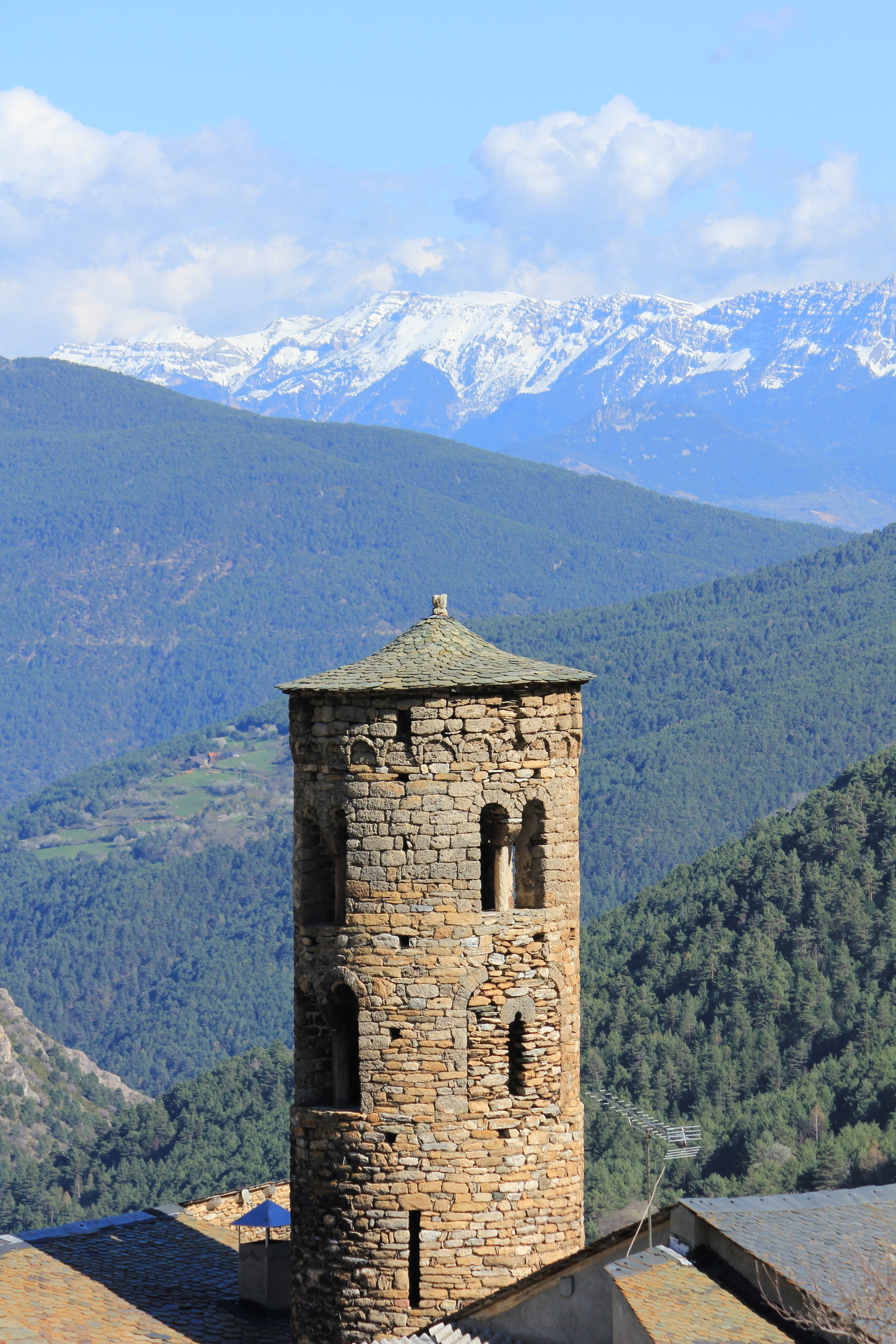 Església de Sant Martí d'Ars (les Valls de Valira)